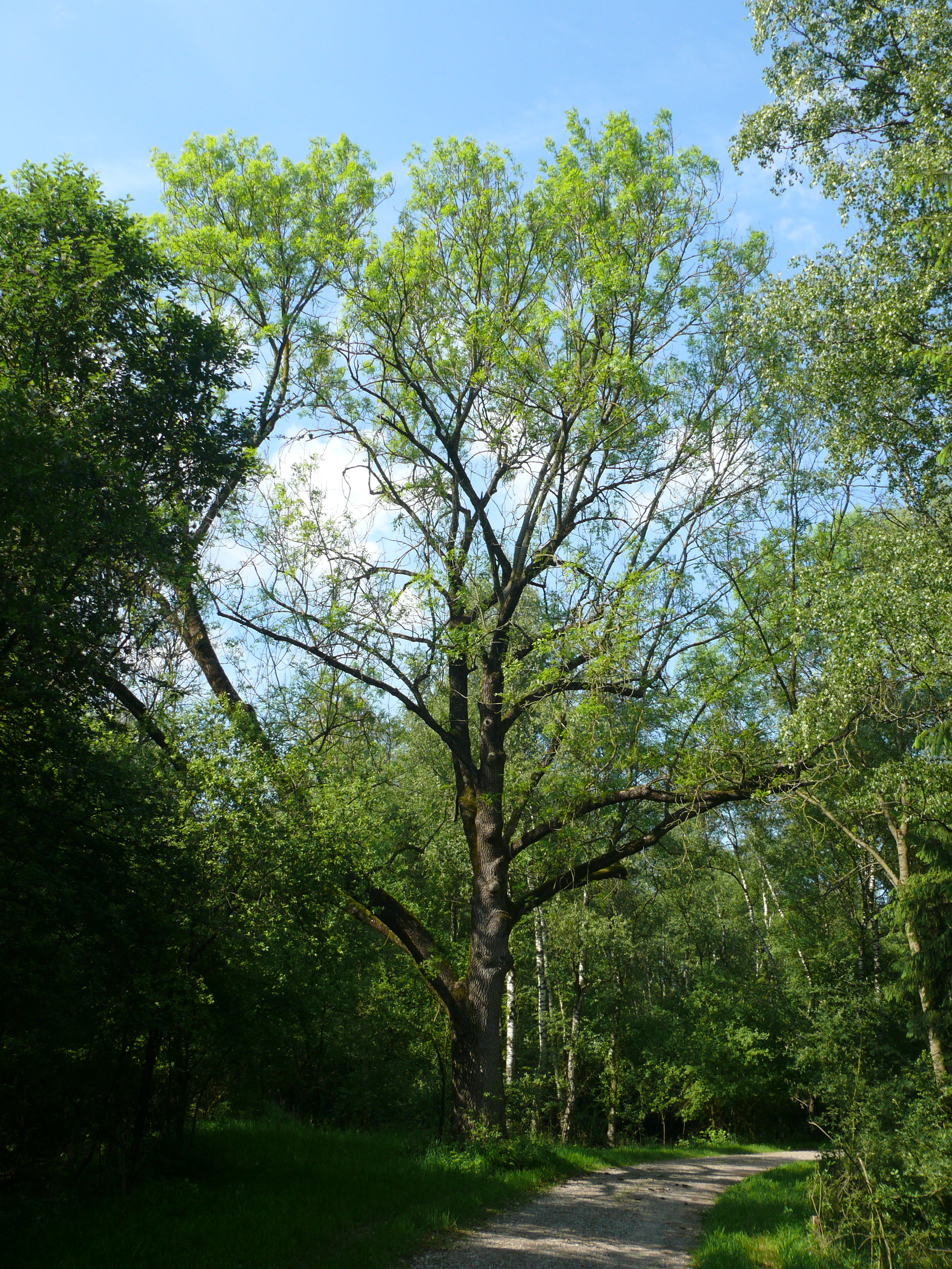 Zengermoos, Landkreis Erding, Bayern, Deutschland